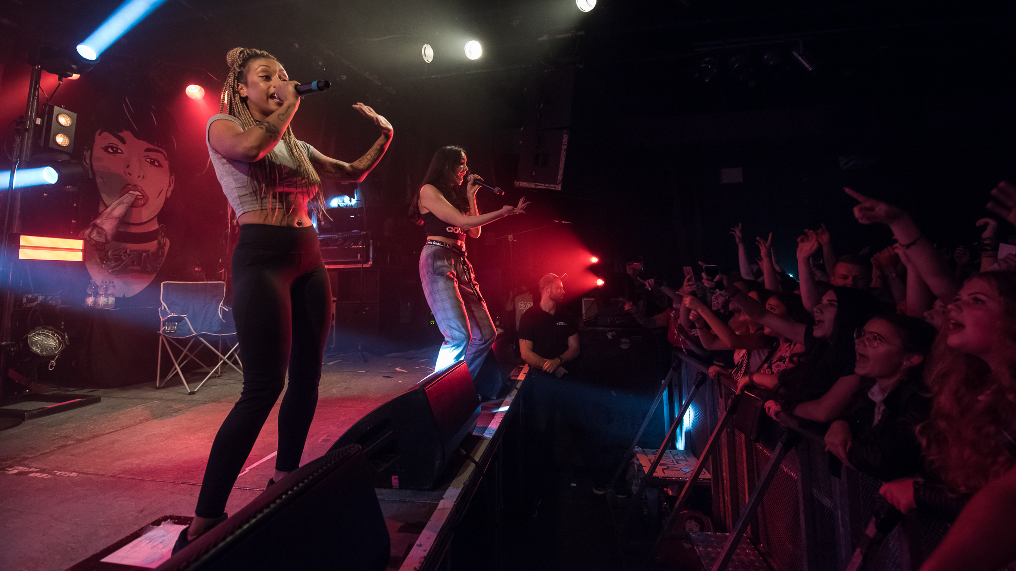 Concertbüro Franken,Der Hirsch,Juju,Konzert,Livekonzert,Livemusik,Musik,Nura,SXTN